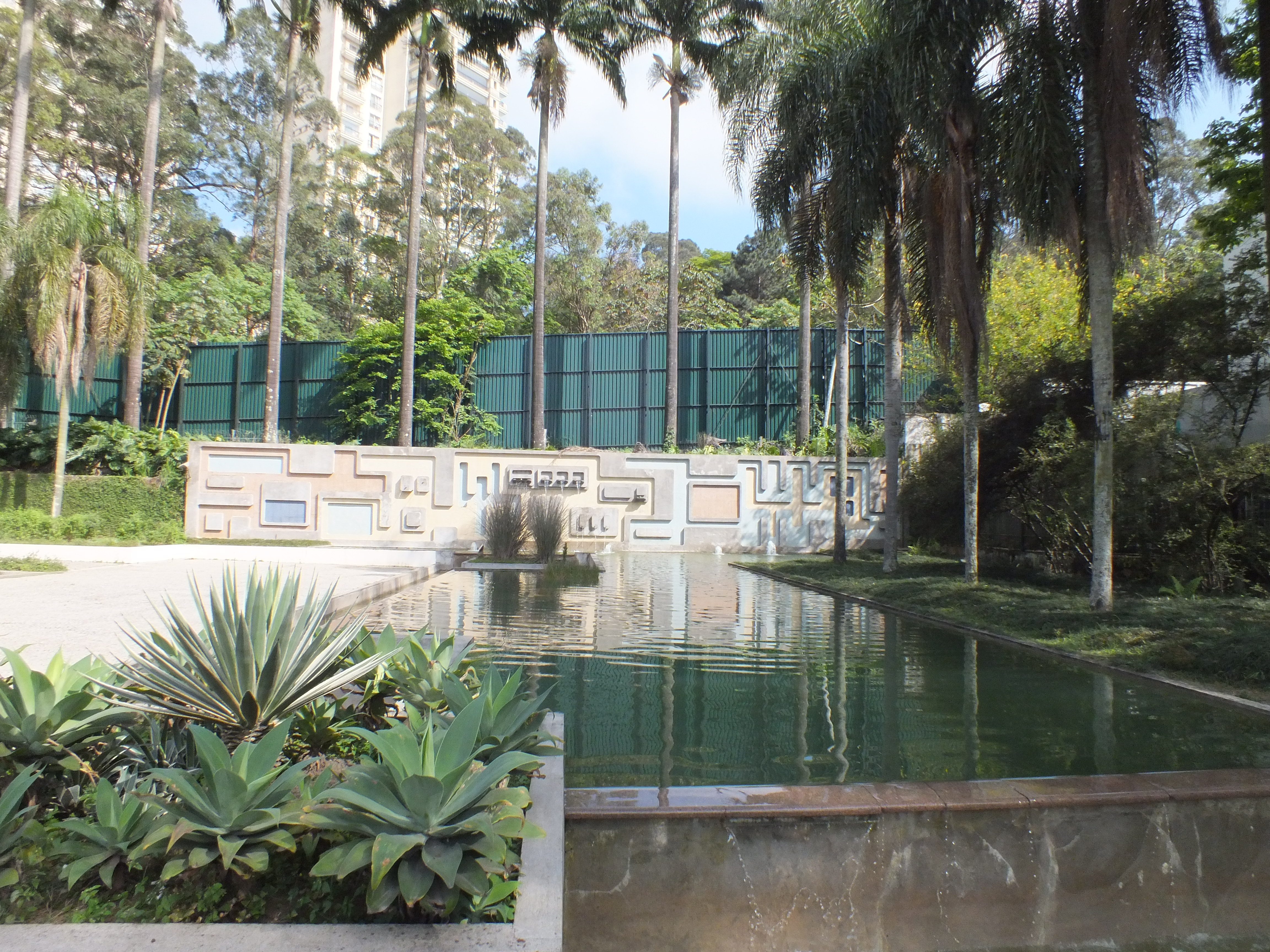 Espelho d'água do jardim Burle Marx - localizado no Parque Burle Marx, Panamby- criado pelo próprio arquiteto Roberto Burle Marx já falecido. Ao fundo é possível ver os painéis em alto-relevo que emolduram o espaço e que abrigam as duas fontes do espelho d'água.